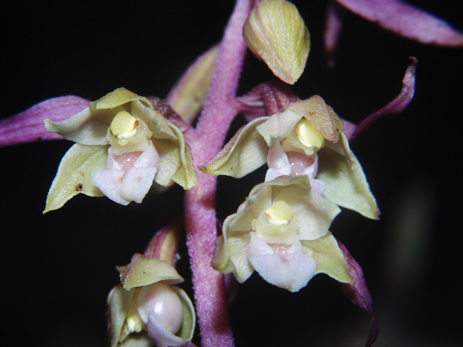 Epipactis purpurata lus. rosea, Schwäbisch-Fränkische Waldberge, Germany